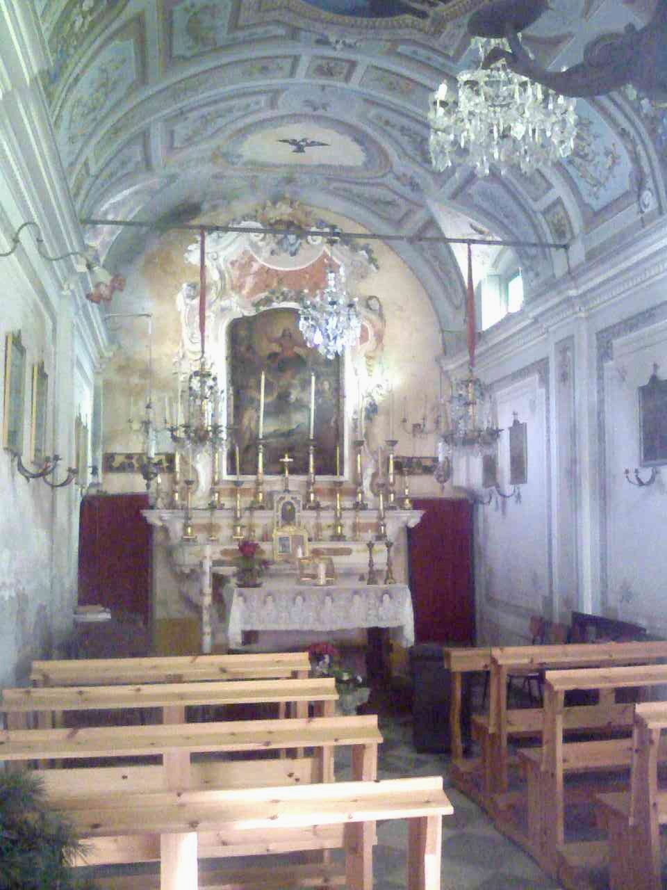 Interno cappella di San Giovanni Battista in località Ferrari di Celle Ligure (Italy)